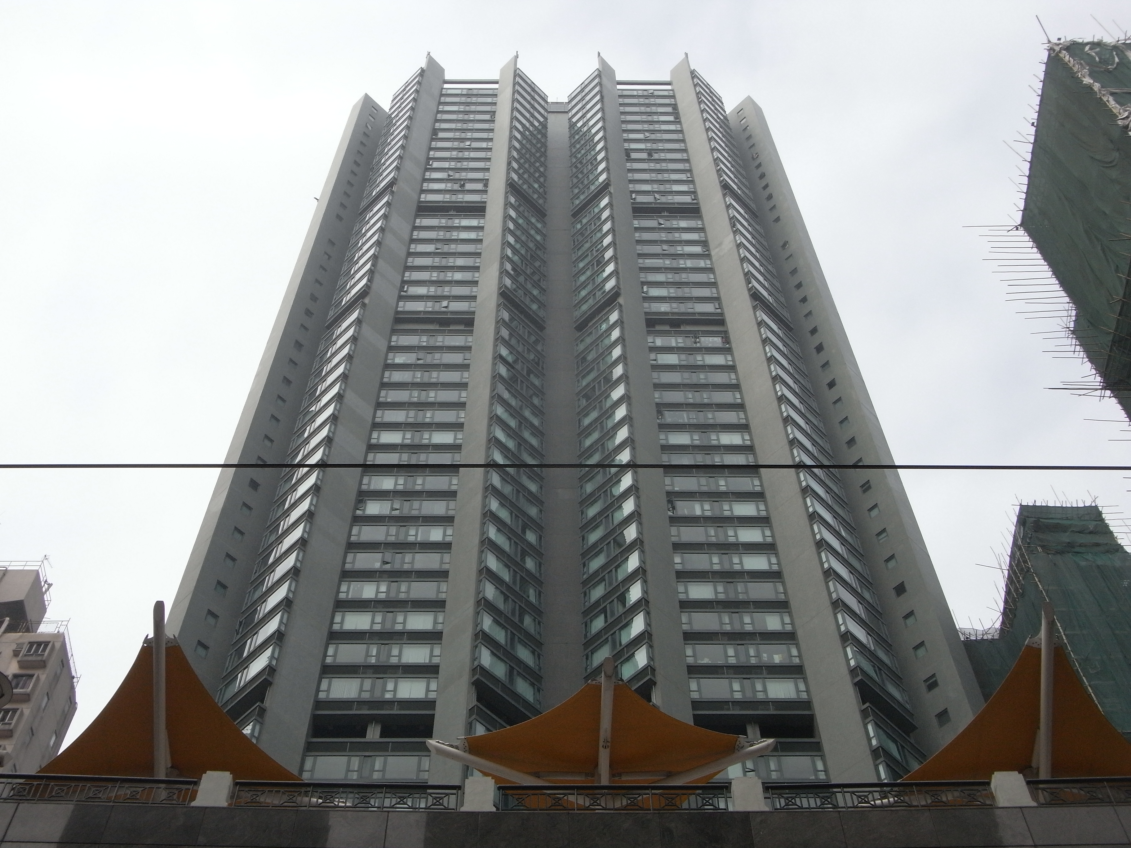 中文（香港）: 堅尼地城 吉席街 高逸華軒